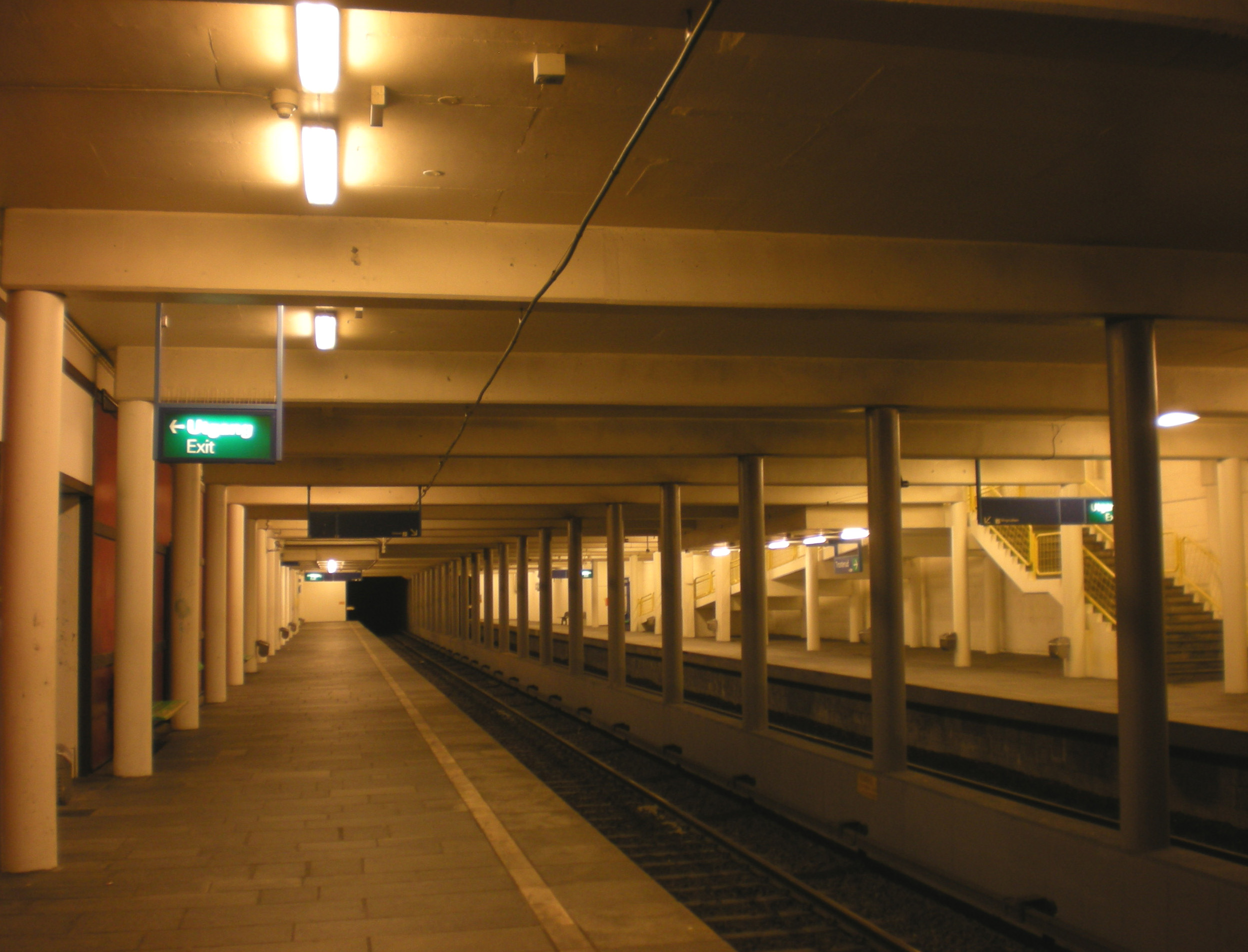 Bilde av Trosterud t-banestasjon. Tatt med Nikon Coolpix L14.